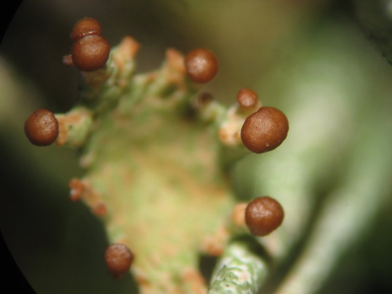 Cladonia spec.